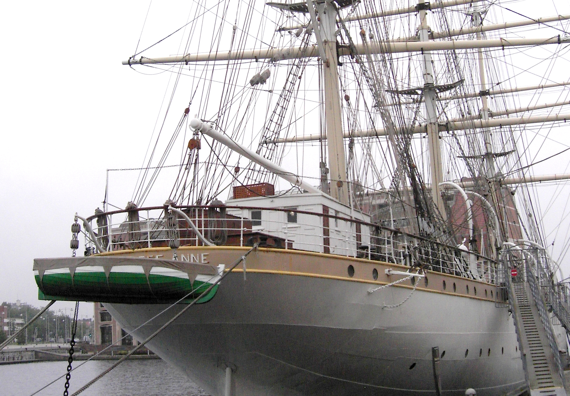 Trois-mâts carré Duchesse Anne (Musée portuaire de Dunkerque, Nord, France).